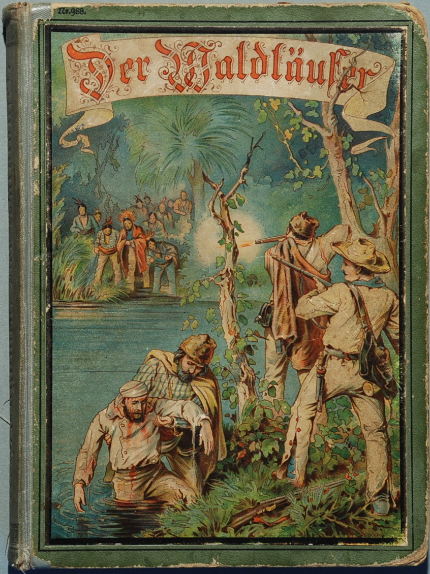 "Der Waldläufer. Erzählung aus dem amerikanischen Wald- und Prärieleben. Nach Gabriel Ferry für die Jugend geschrieben von A. H. Fogowitz. Mit 5 feinen Farbrucken nach Aquarellen von Wilh. Schäfer. Nr. 988."[ohne Ort, Verlag und Jahr]; auf dem Rückendeckel in Blindprägung: "Jugendschriften 1857".